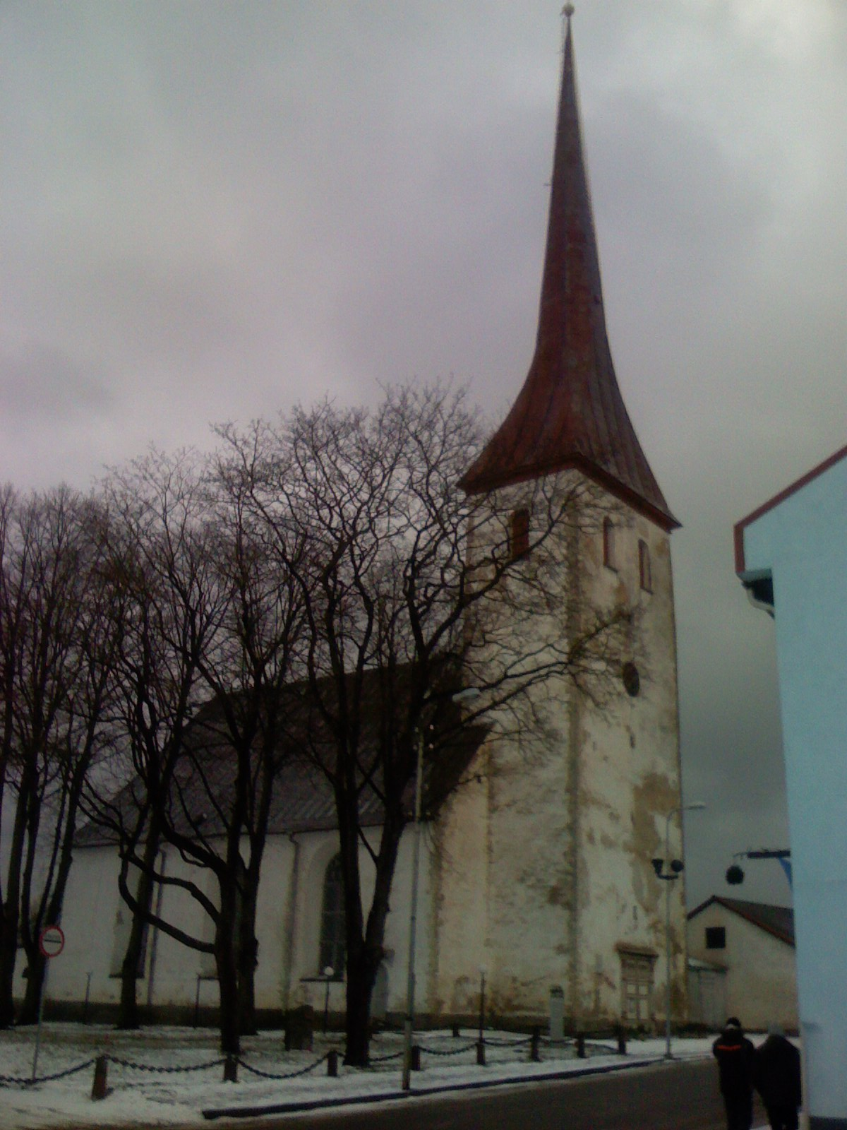 Rakvere Kolmainu ehk Mihkli kirik